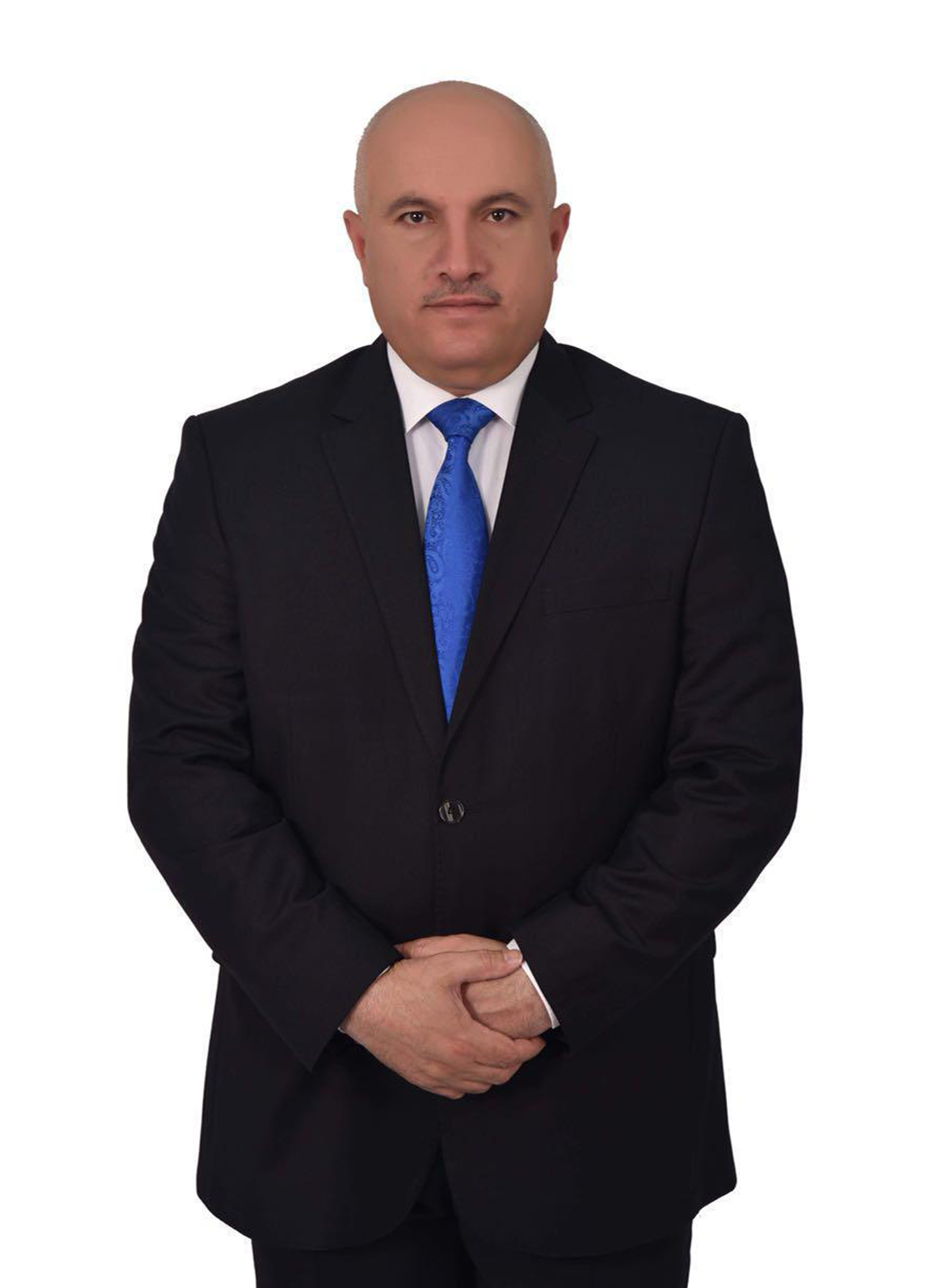 صورة شخصية ل علي المتيوتي نائب سابق وسياسي عراقي